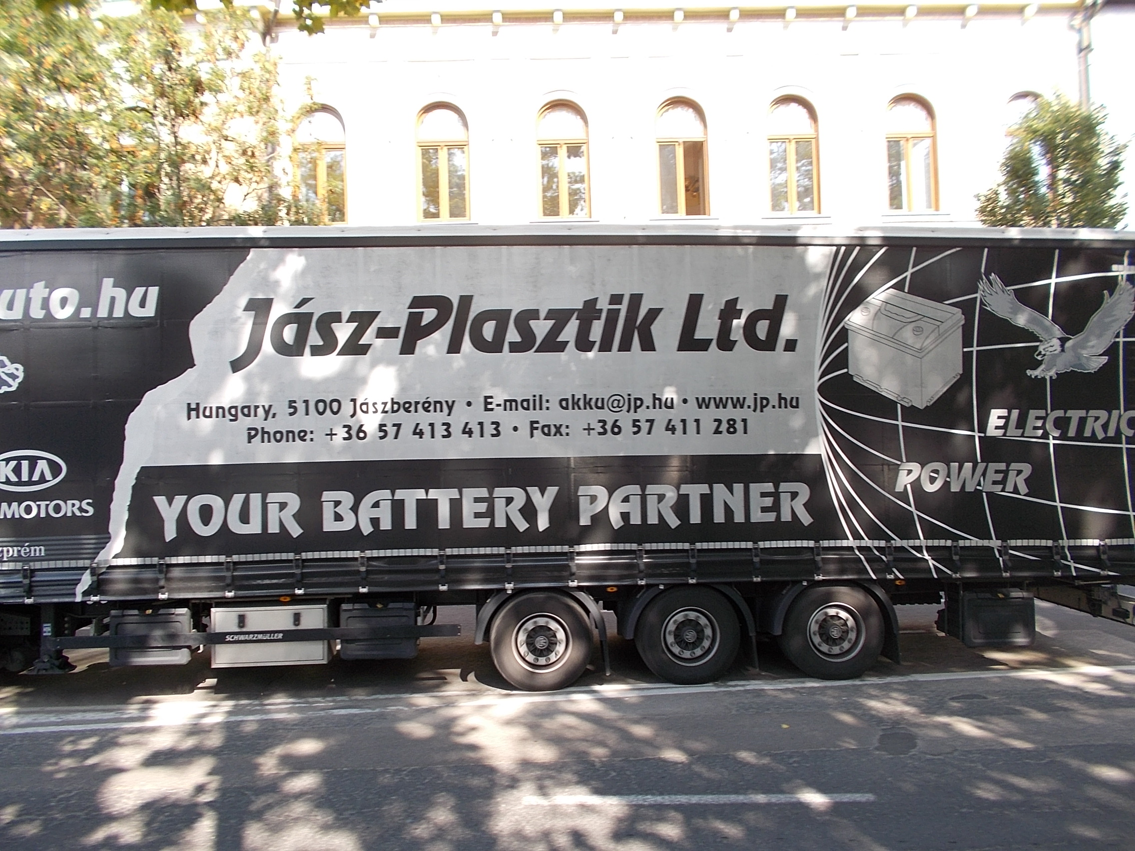 Jász-Plasztik kamion. - Magyarország, Jász-Nagykun-Szolnok megye, Jászberény